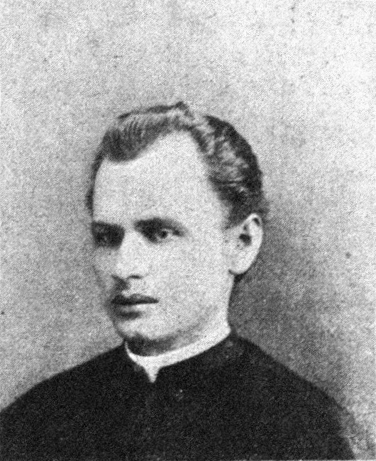 Österreichischer Politiker, Reichsratswahl 1907, Name siehe Dateiname